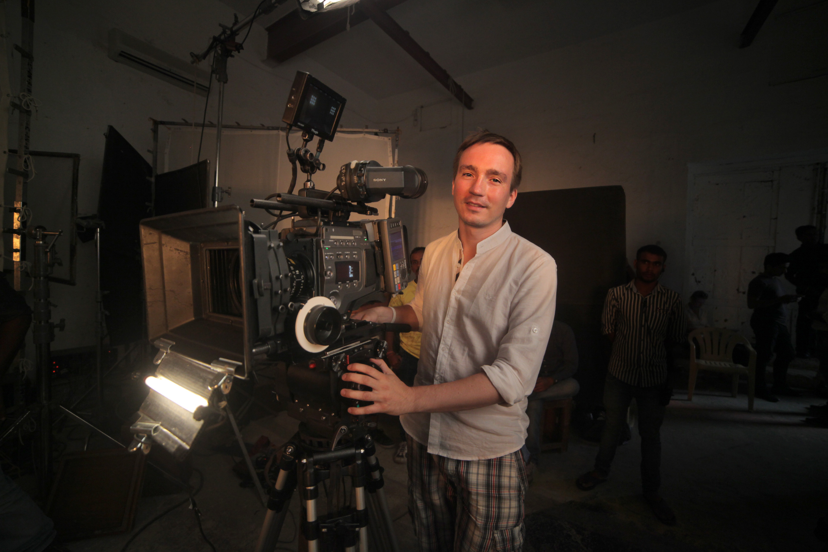 Portret polskiego operatora filmowego Szymona Lenkowskiego